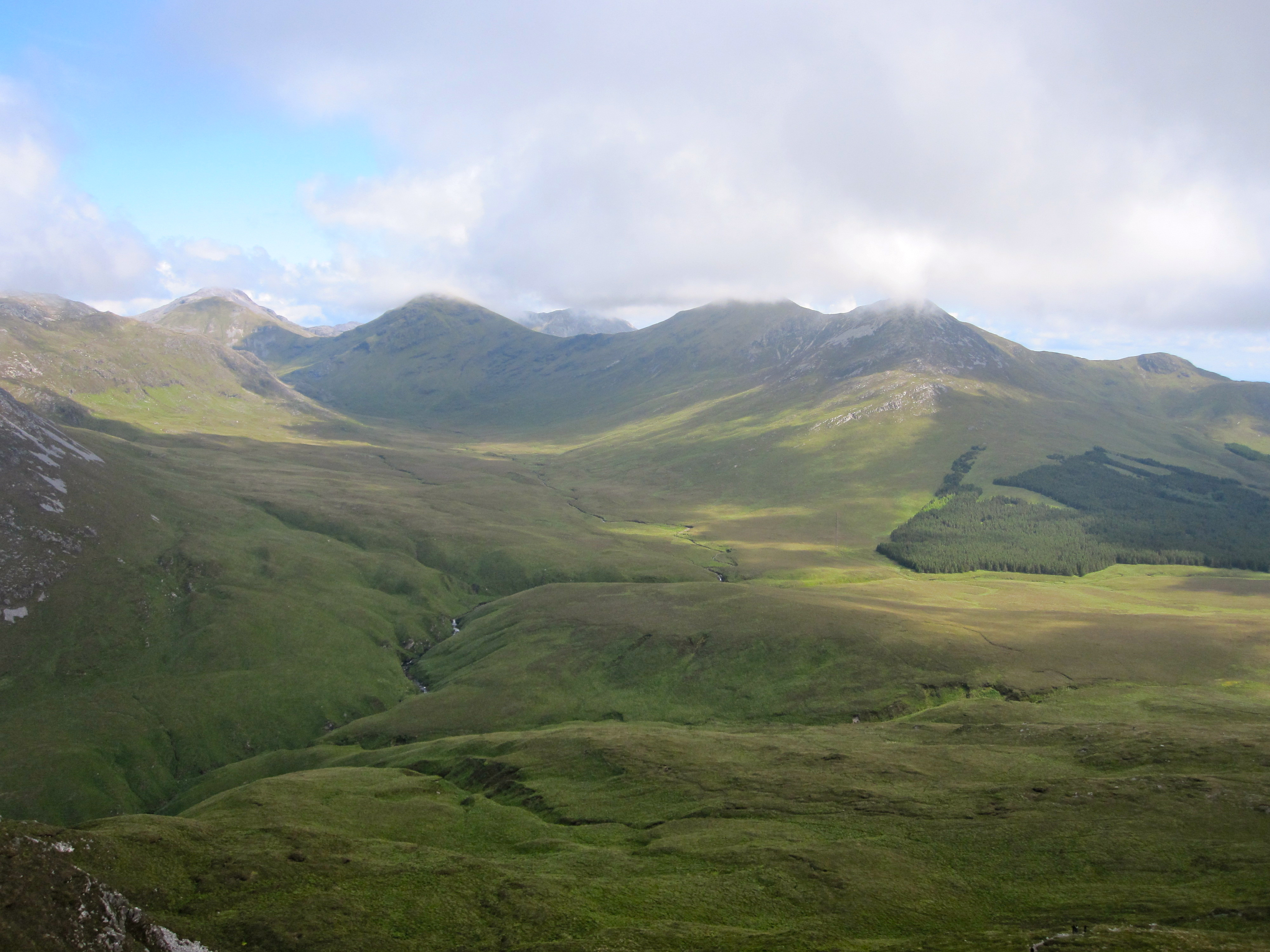 Aussicht vom Gipfel des Diamond Hill im Connemara National Park, Irland